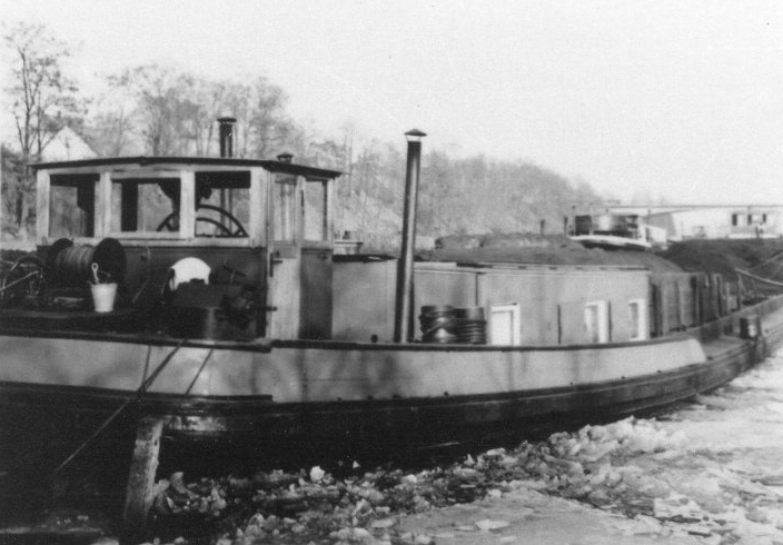 Heckansicht Göring-Kahn